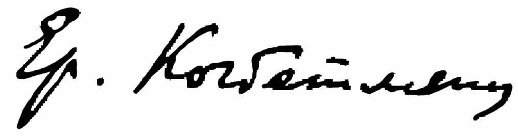 Подпись Ерванда Геворговича Когбетлянца